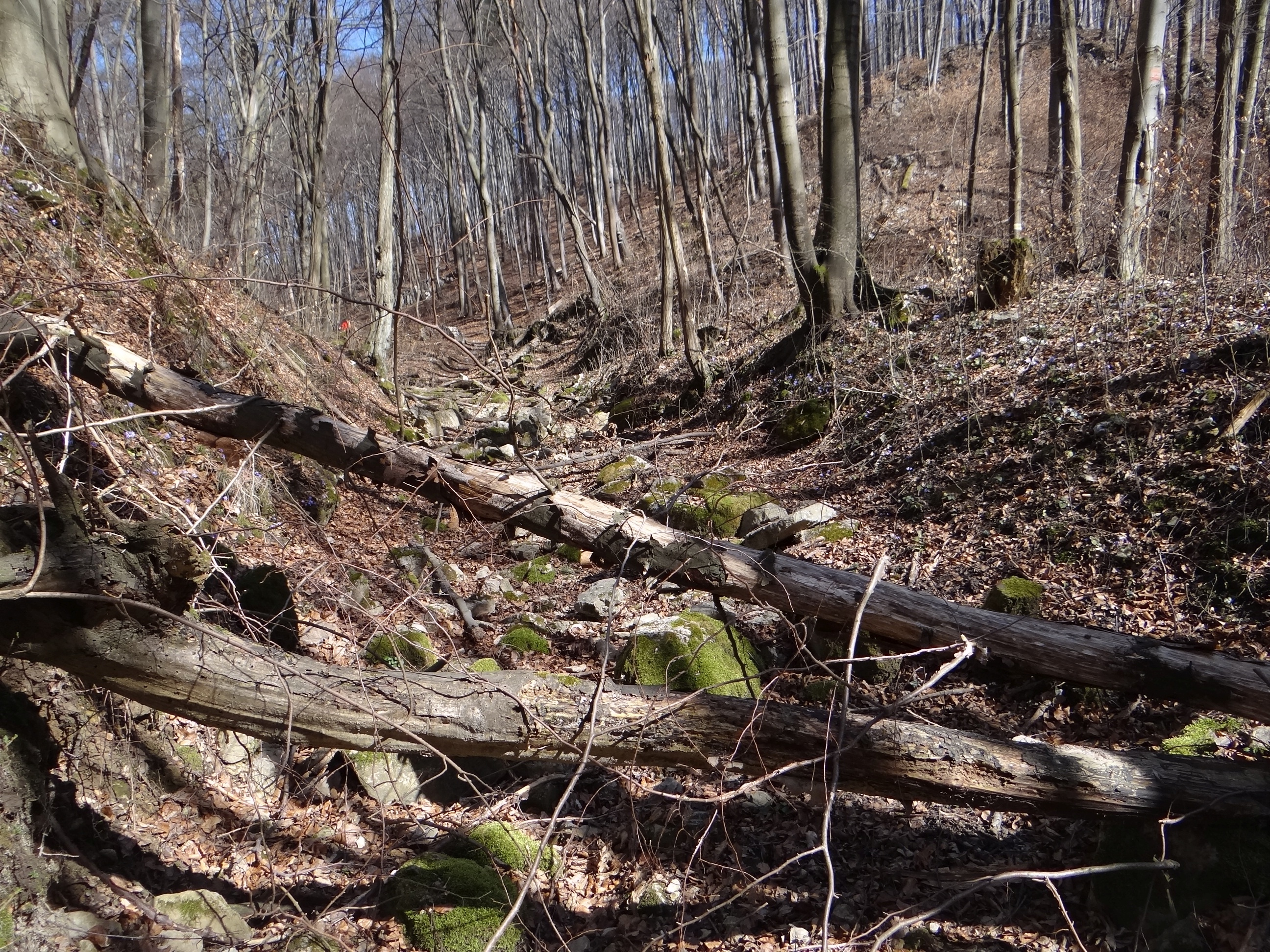 Wąwóz Stradlina w Dolinie Racławki